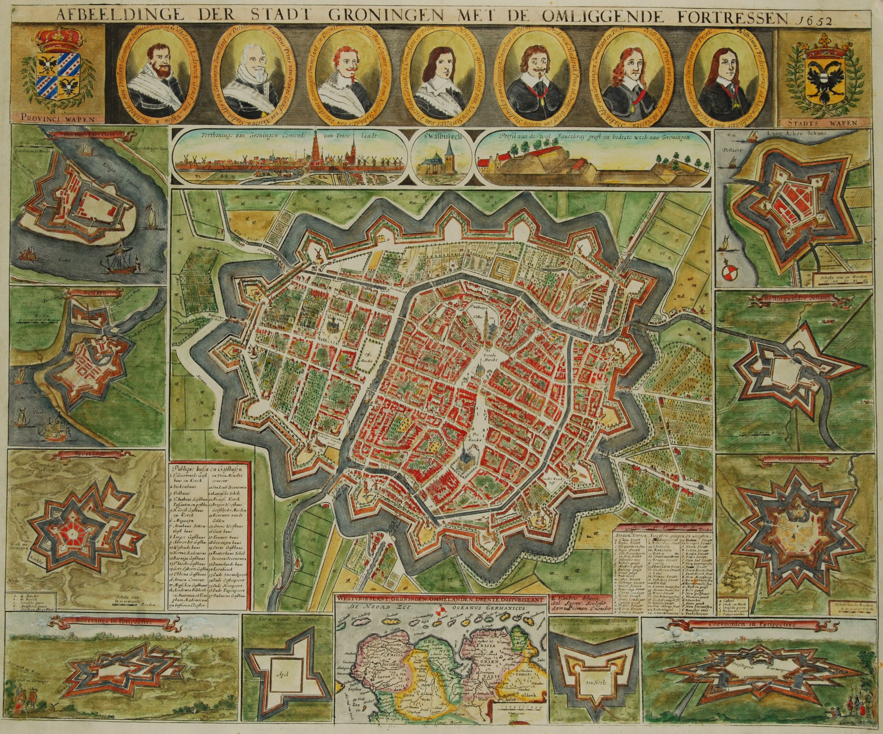 “AFBEELDINGE DER STADT GRONINGEN MET DE OMLIGGENDE FORTRESSEN 1652”, de zogeheten ‘Kleine Haubois’ Kopergravure vervaardigd door Salomon Savery naar het ontwerp van Egbert Haubois, uitgegeven door Samuel Pieman. 5e uitgave (van V), waarbij midden onderaan een adres heeft gestaan, dat uit de koperplaat is weggewist. Egbert Haubois (ca. 1602/1610 – 1653) kreeg in 1631 toestemming van het stadsbestuur om deze “stadt in een coperen plaet uijt te snijden”. Wat hij vastlegde was de sterkste vestingstad in het noorden van de Republiek. Het stadsbestuur zocht na een uitbreiding van de vestingwerken in het begin van de 17e eeuw, naar mogelijkheden Groningen ook op economisch gebied een bloeiende metropool te maken. Maar de kaart toont dat aan het begin van de dertiger jaren de droom van voorspoed niet was uitgekomen, ambitieuze economische plannen waren niet verwezenlijkt en grote terreinen binnen de vestingwerken zijn onbebouwd gebleven. Haubois’ grote plattegrond werd uitgegeven in 1645. Dit ontwerp voor de plattegrond werd een aantal jaren later gebruikt als basis voor een verkleinde versie van de kaart (de zogeheten ‘Kleine Haubois’): de stad met omliggende vestingen. Met in de bovenrand de wapens van de provincie en de stad, en daartussen 7 portretten van stadhouders sinds 1594. Daaronder een stadsprofiel, een afbeelding van de St. Walburgkerk, en een profiel van een wal. In de linker rand plattegronden van vestingen: Lieroort, Delfzijl, en Bourtange. In de rechter rand plattegronden van de Langakkerschans, Bellingwolderschans en Coevorden. Ook in de benedenrand enkele vestingen. Midden onder een kaartje van de provincie Groningen, gebaseerd op de kaart van Barthold Wicheringe.